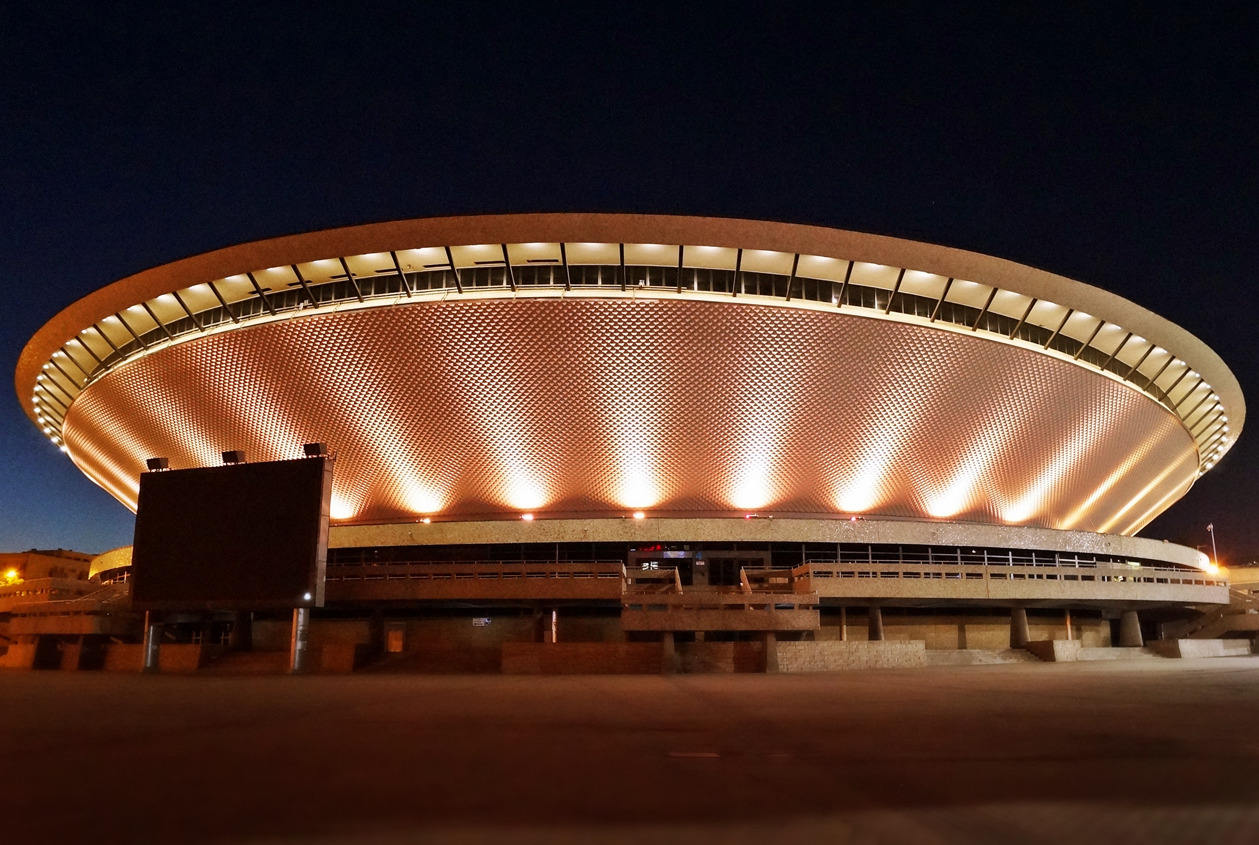 Spodek w Katowicach